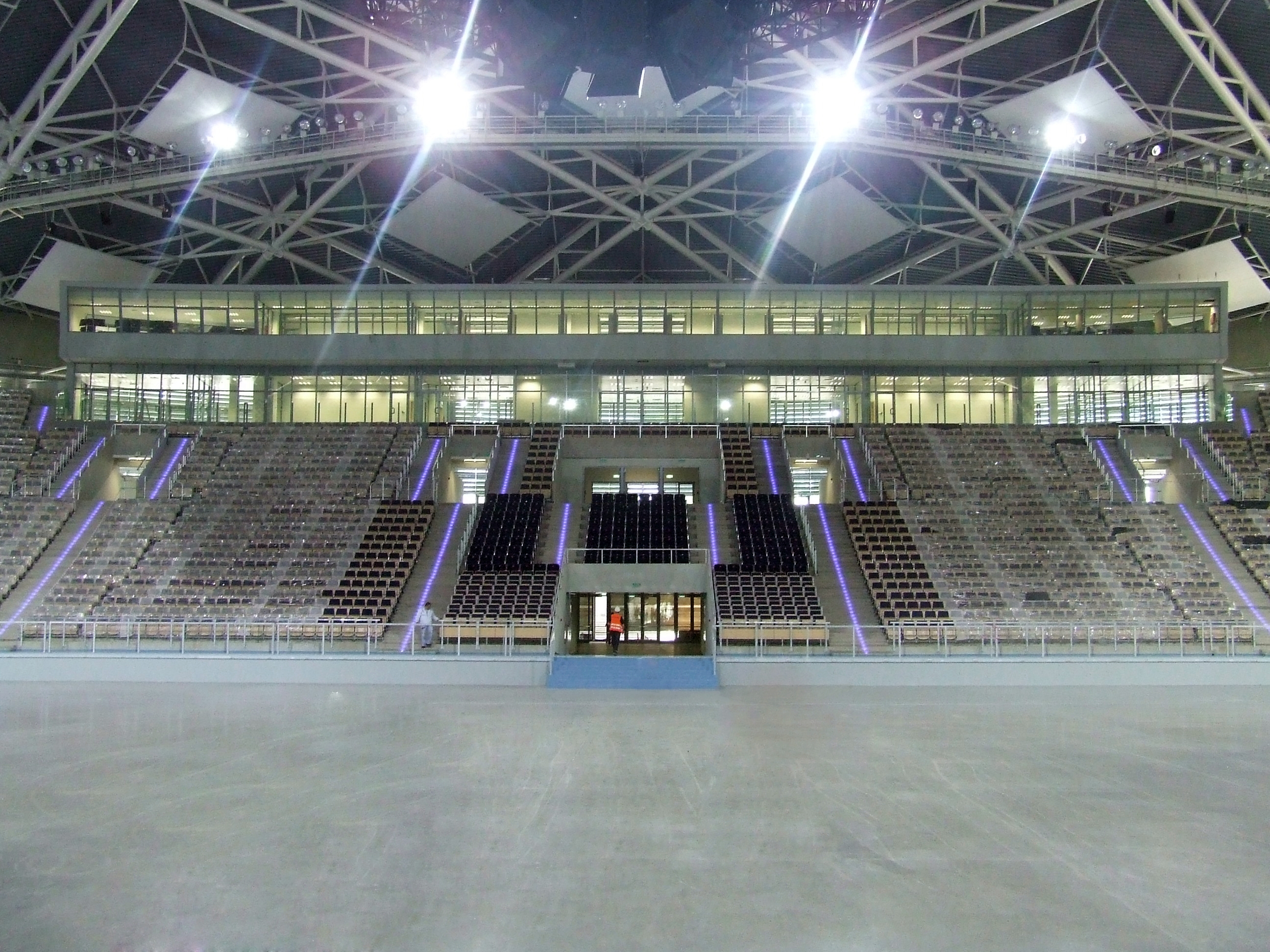 Wnętrze hali widowiskowo-sportowej w Łodzi (maj 2009)